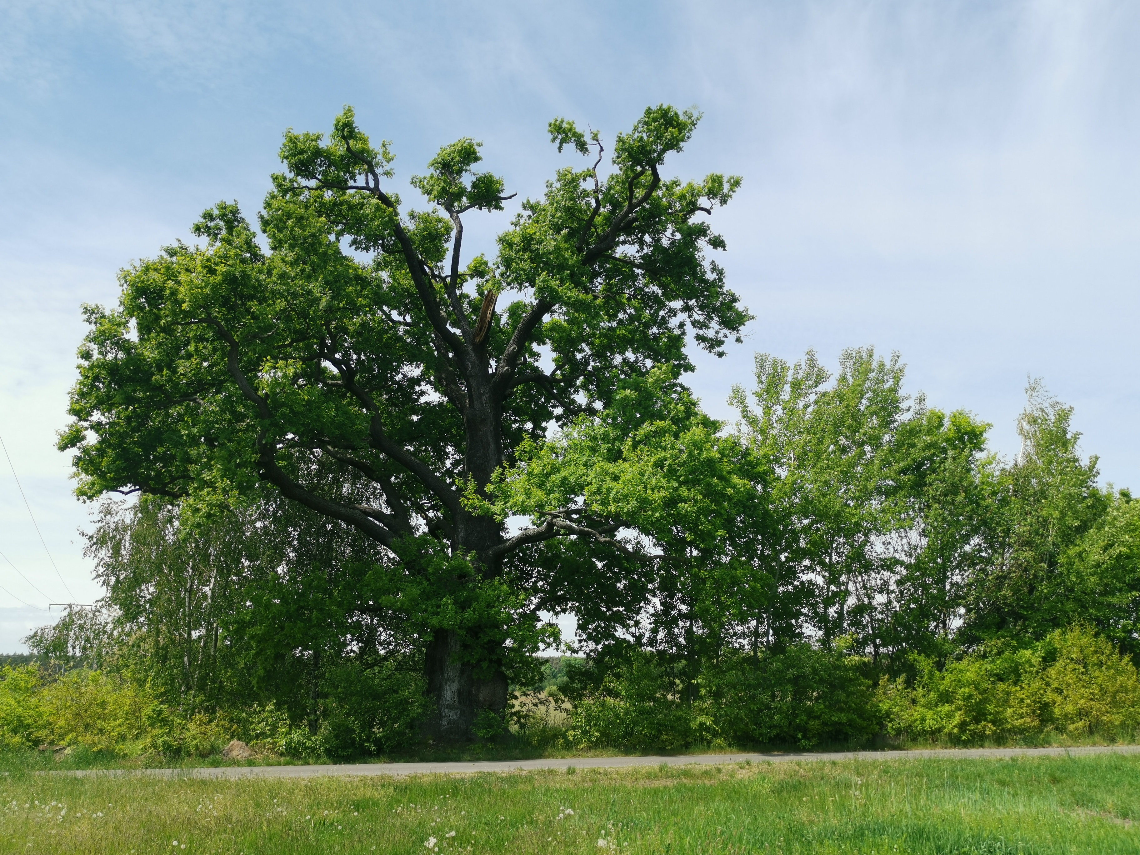 Als Naturdenkmal geschützte Stieleiche in Sella